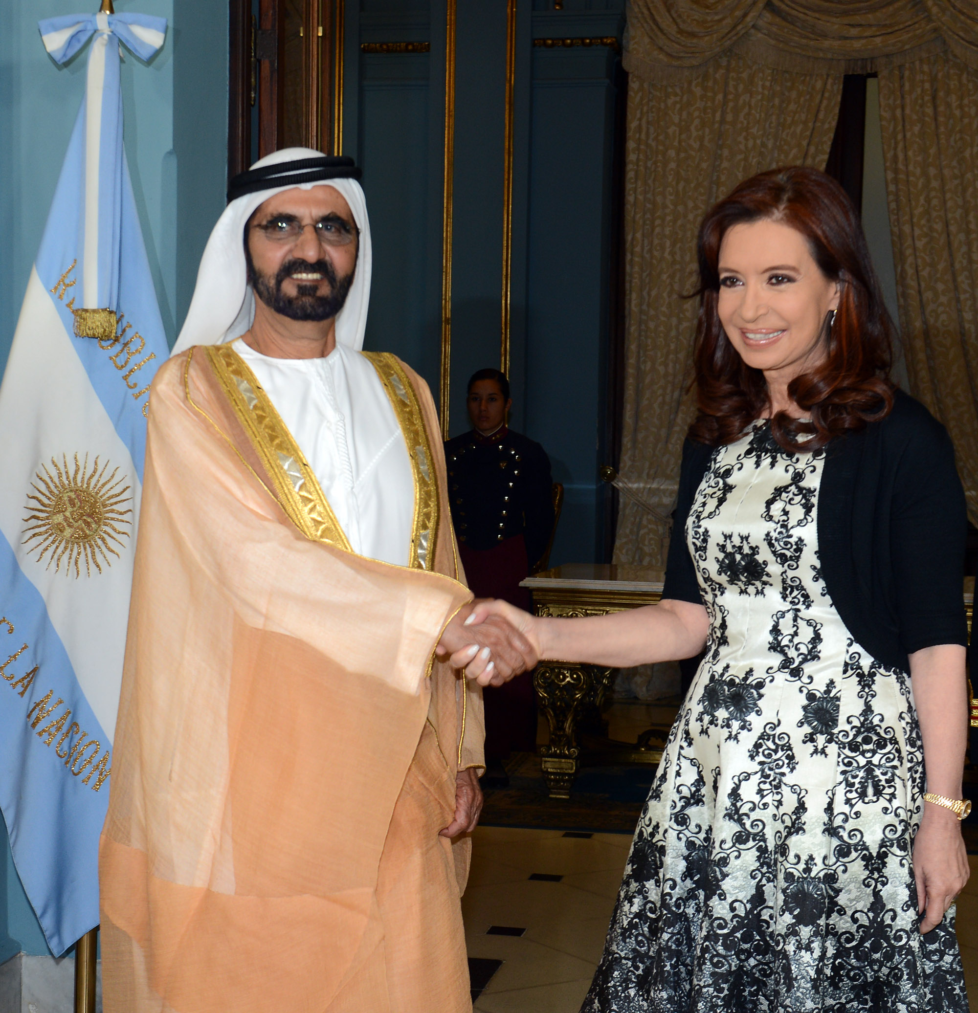 Este mediodía en Casa de Gobierno, la Presidenta de la Nación, Cristina Fernández de Kirchner, junto con el Vicepresidente de los Emiratos Árabes Unidos, Primer Ministro y Gobernador de Dubai, el Jeque Mohammed bin Rashid Al Maktoum, encabezaron el acto de firma de un Memorando entre ambos países para la cooperación en los Usos Pacíficos de la Energía Nuclear en los Emiratos Arabes Unidos. Además, la jefa de Estado fue invitada por el vicepresidente de los Emiratos Árabes Unidos, Sheikh Mohammed Bin Rashid al Maktoum, a visitar Dubai.